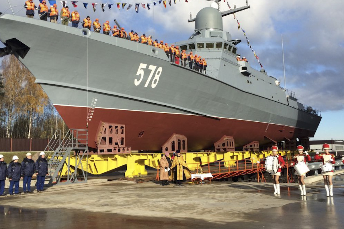 Церемония спуска на воду построенного для Военно-Морского Флота России третьего серийного (четвертого по счету) малого ракетного корабля нового поколения проекта 22800 «Буря» на судостроительном предприятии «Пелла»